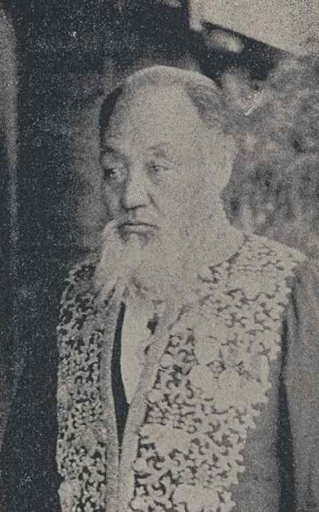 青山貞男爵（1826～1898）